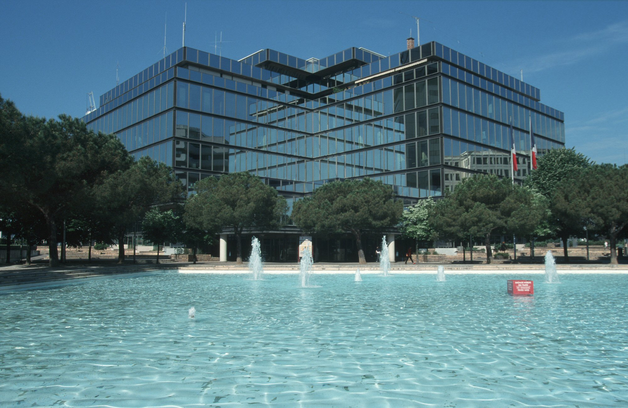 Photo de l'hôtel du département - Bordeaux, MERIADECK